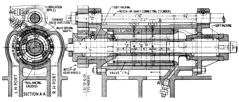 Hülsensteuerventile der Paget-Lokomotive